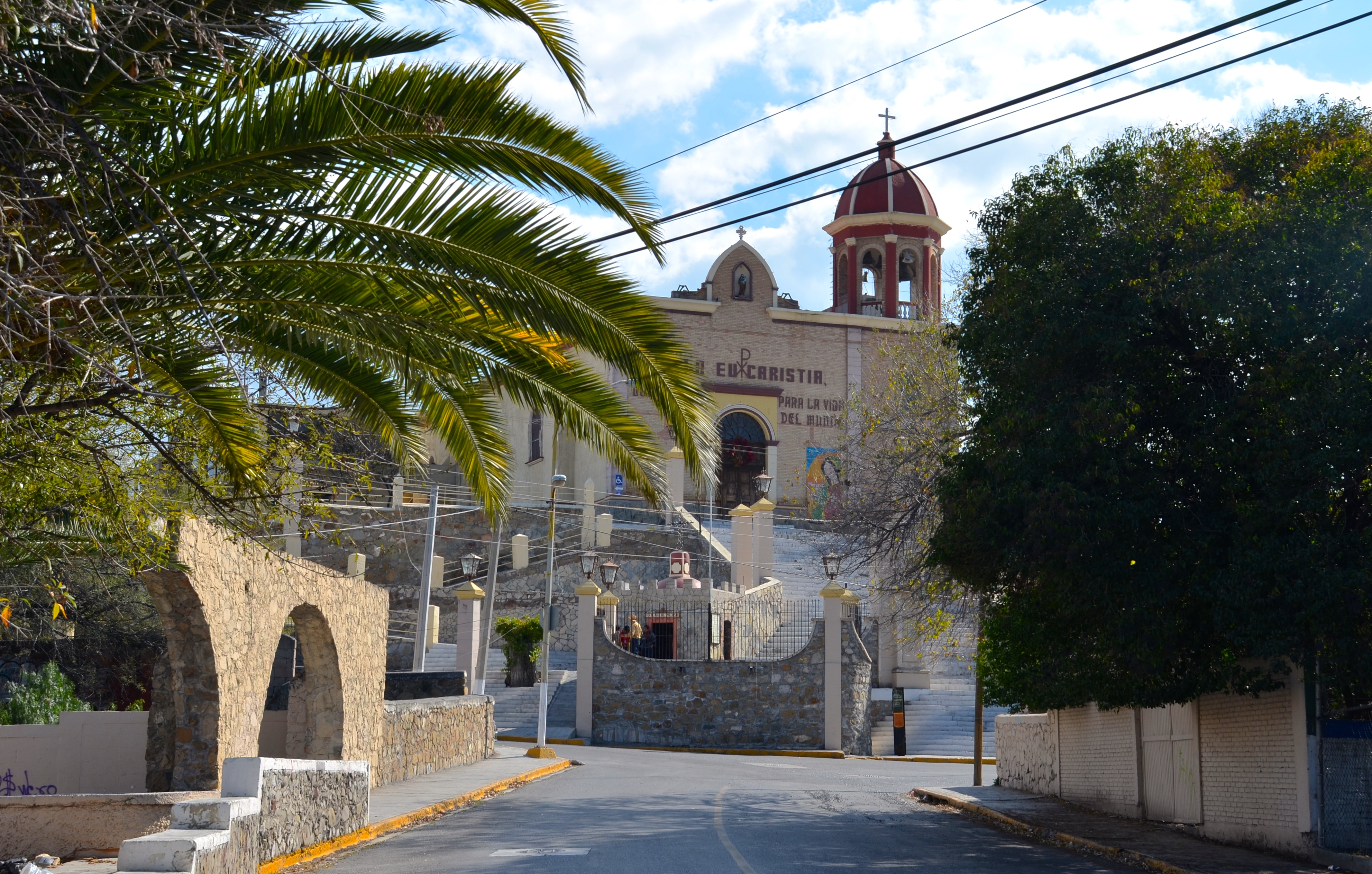 Antiguo barrio del ojo de agua Se puede determinar que el nombre de la ciudad se debe a una formación de agua, la cual todavía existe y se encuentra en la escalinata de la Iglesia del ojo de agua, se puede visitar y gracias a su pureza es potable.